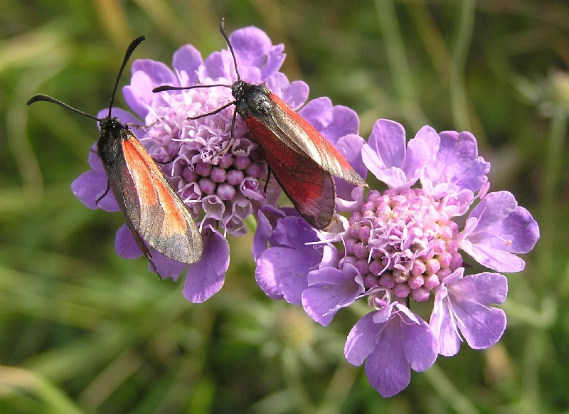 Beschreibung: Widderchen (evtl. Zygaena minos) auf Skabiose (Scabiosa columbaria) Quelle: Fotografiert im August 2005 auf einem sonnigen Südhang mit Magerrasen in etwa 650 Meter Höhe in Mittelfranken (Hesselberg). Lizenz: GFDL ---- Hinweise von de.wikipedia: Ich kopiere noch ein paar Ideen von meiner Diskussionsseite dazu: Es könnte sich um das Thymian-Widderchen Zygaena purpuralis handeln, diese Art kann jedoch vom Bibernell-Widderchen (Zygaena minos) nur durch Genitaluntersuchung unterschieden werden. Eventuell kommt noch das Platterbsen-Widderchen (Zygaena osterodensis) in Betracht. Viele Grüße, --Olei 23:36, 7. Aug 2005 (CEST) :Die Skabiose kann eigentlich nur die Tauben-Skabiose (Scabiosa columbaria) sein. Eine zweite ähnliche Art, die Duft-Skabiose (Scabiosa canescens), kommt zwar nicht sehr weit entfernt auf der Frankenalb vor, ist aber viel seltener und hat eher graublaue Blüten ohne diesen deutlichen Rotstich, wie er auf dem Bild zu sehen ist. Für eine sichere Unterscheidung der Skabiosen sind einerseits die Blätter wichtig, andererseits sind aber die besten Merkmale im Fruchtzustand zu sehen. Fruchtende Köpfe wären sehr erwünscht. Grüße --Franz Xaver 12:36, 8. Aug 2005 (CEST)